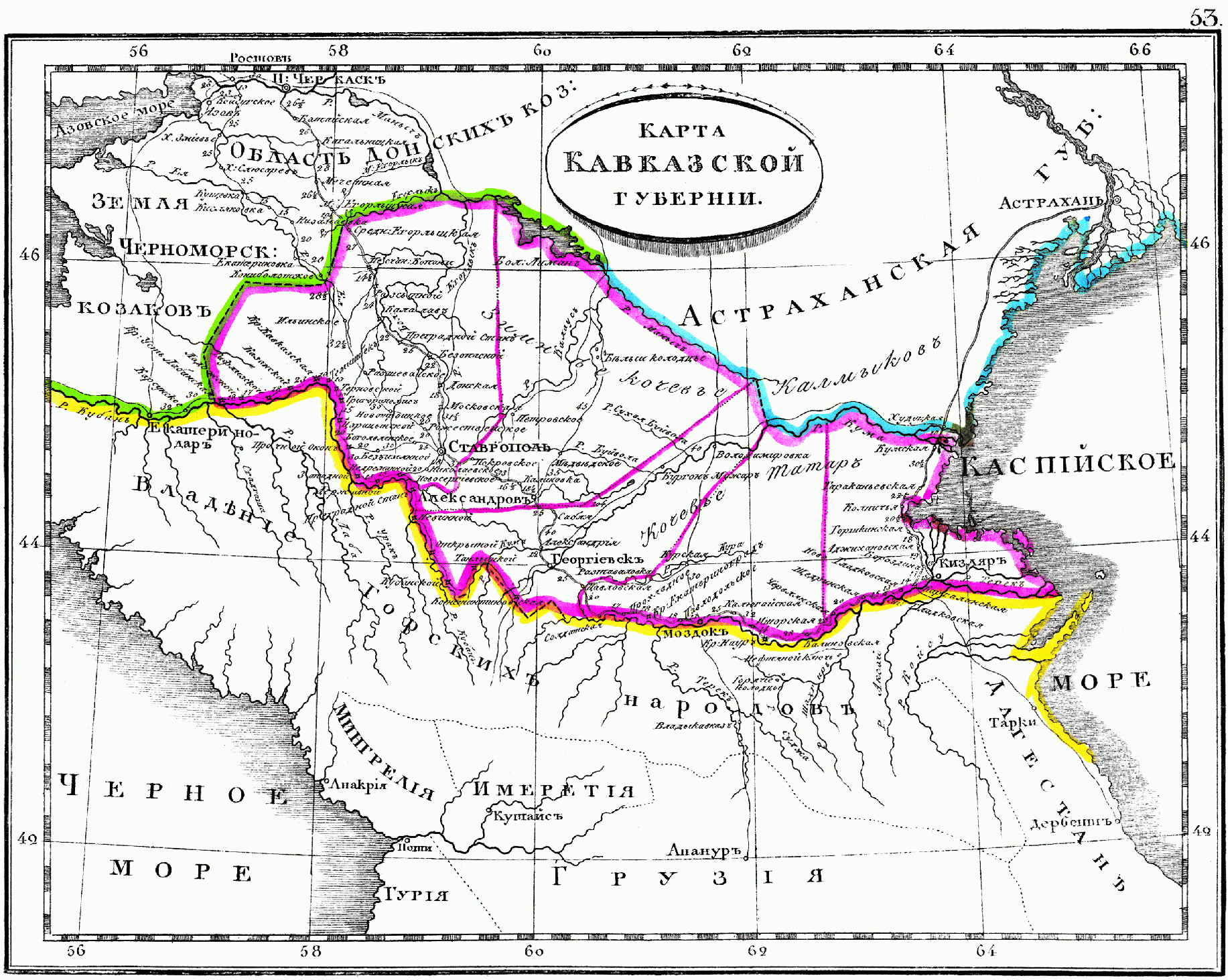 Карта Кавказской губернии, 1835